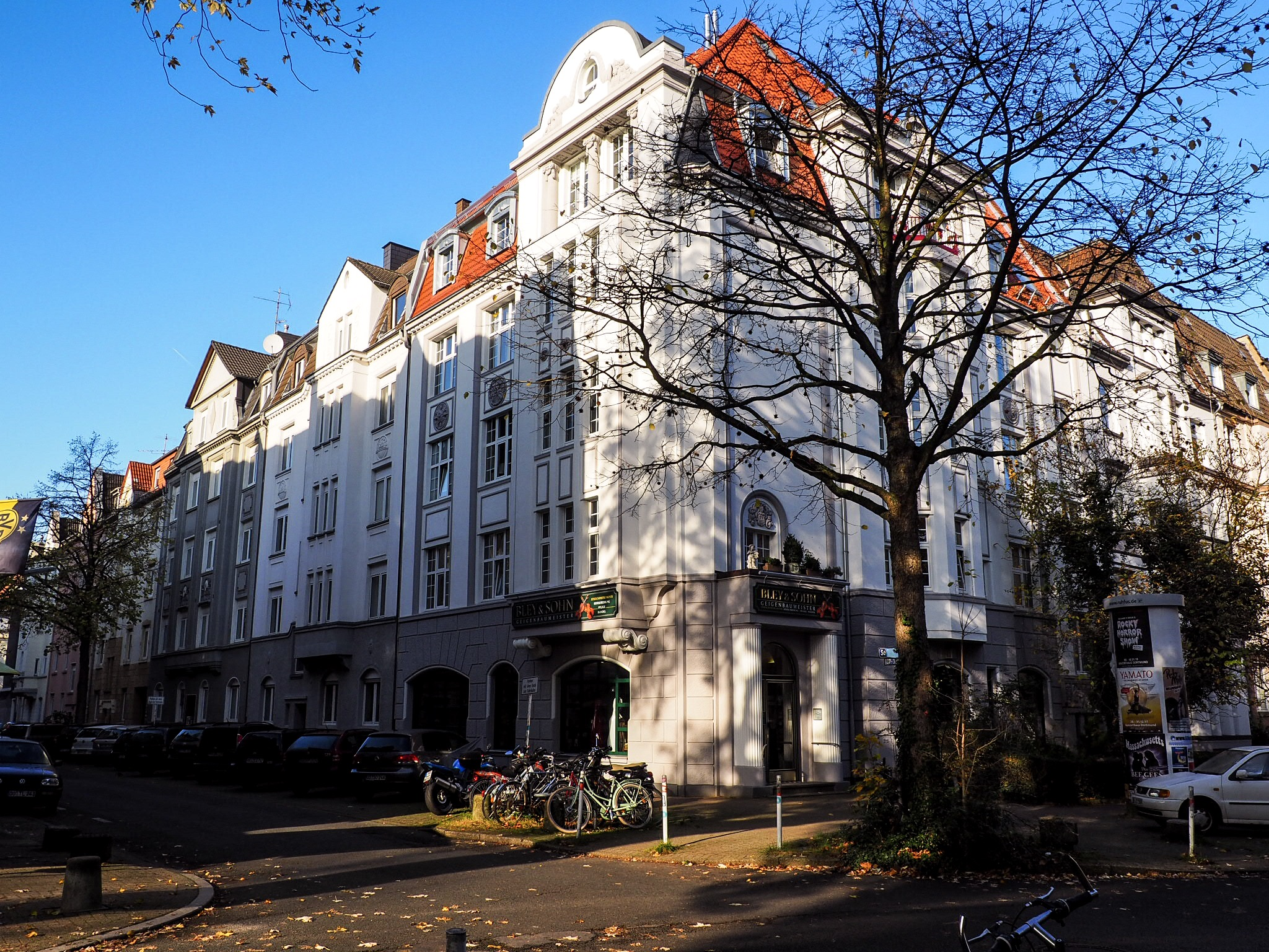 Häuserzeile Kreuzviertel, Arneckenstraße